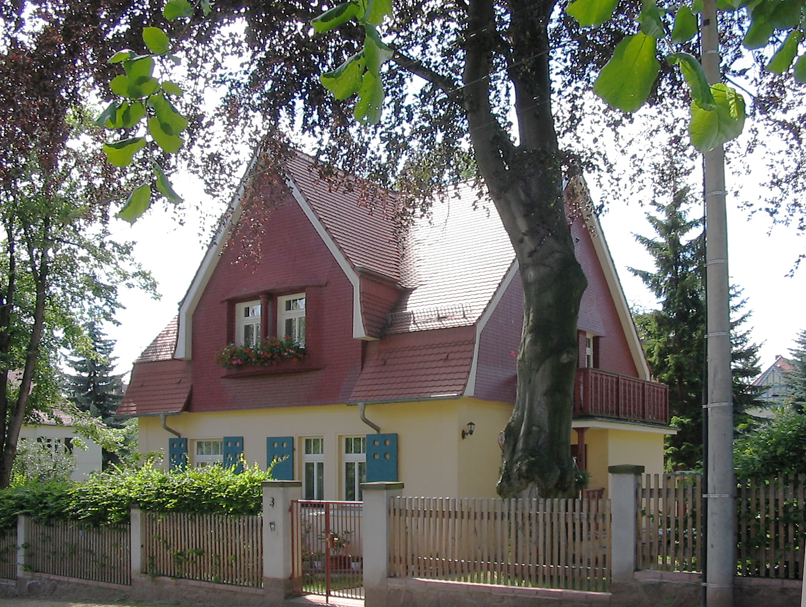 Radebeul, Villenkolonie Altfriedstein, Landhaus Lutzmann, Traufseite